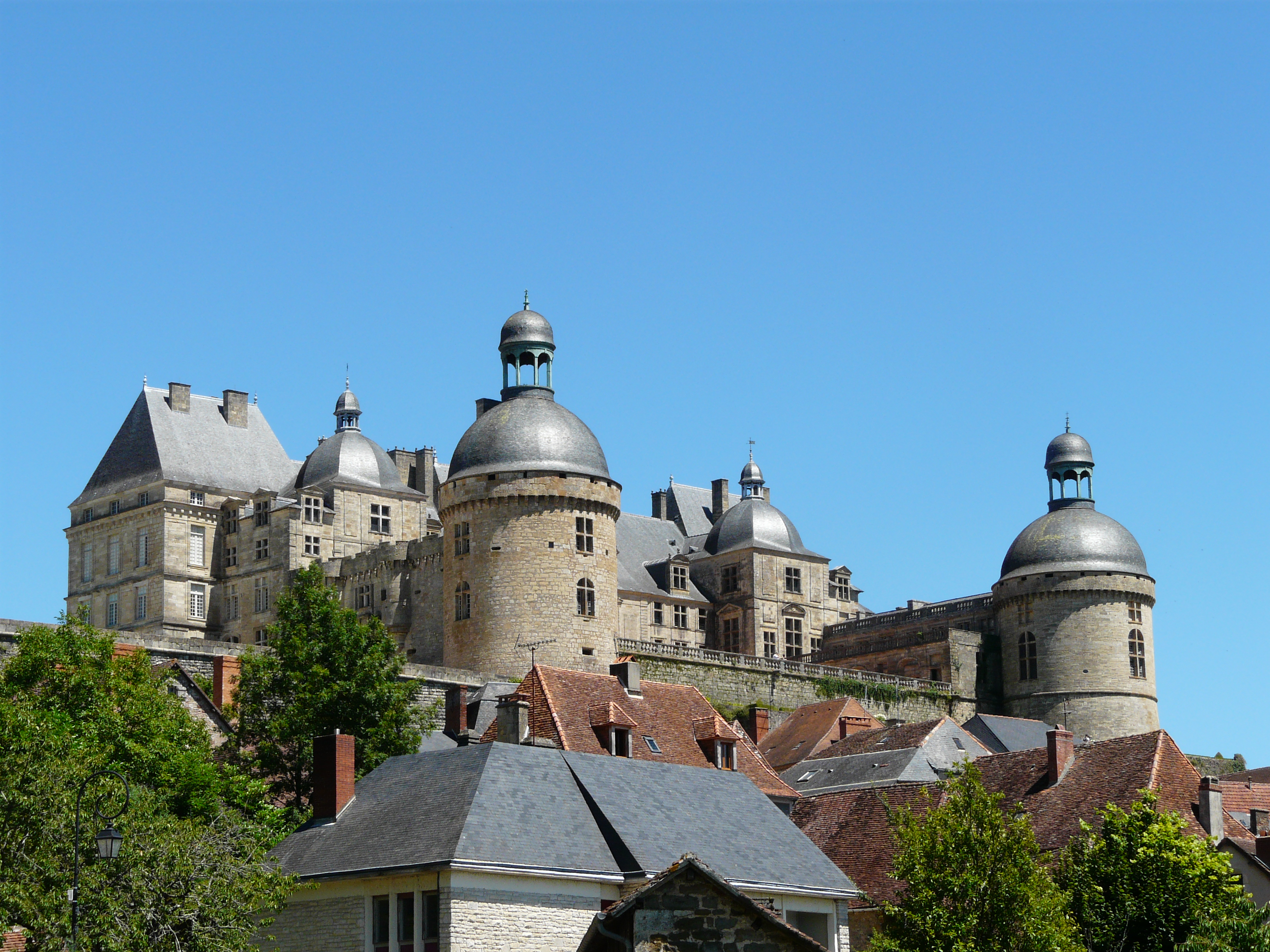 Le château de Hautefort vu depuis le sud-ouest, Dordogne, France.